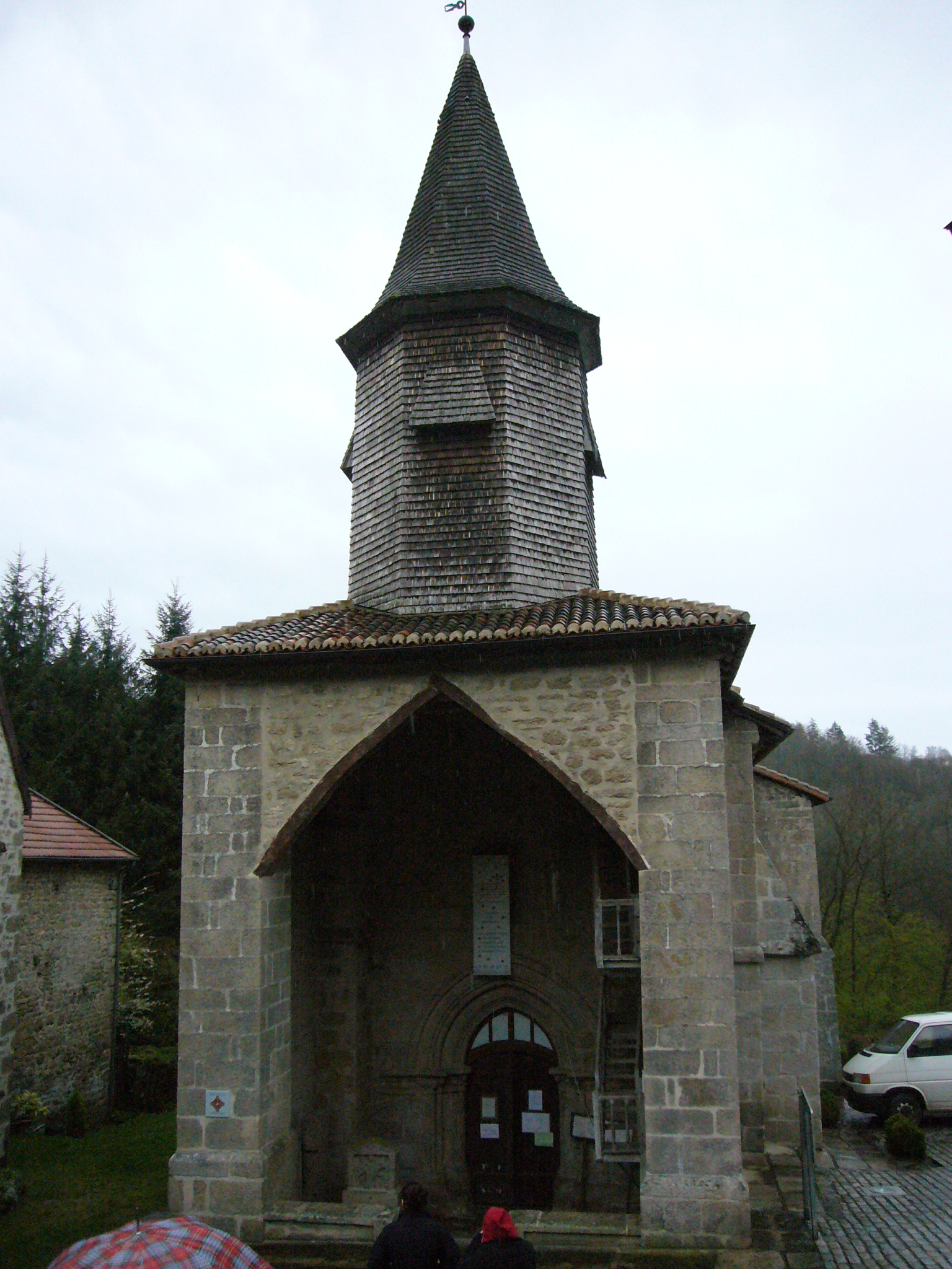 L'église de Jabreilles, Haute-Vienne, France